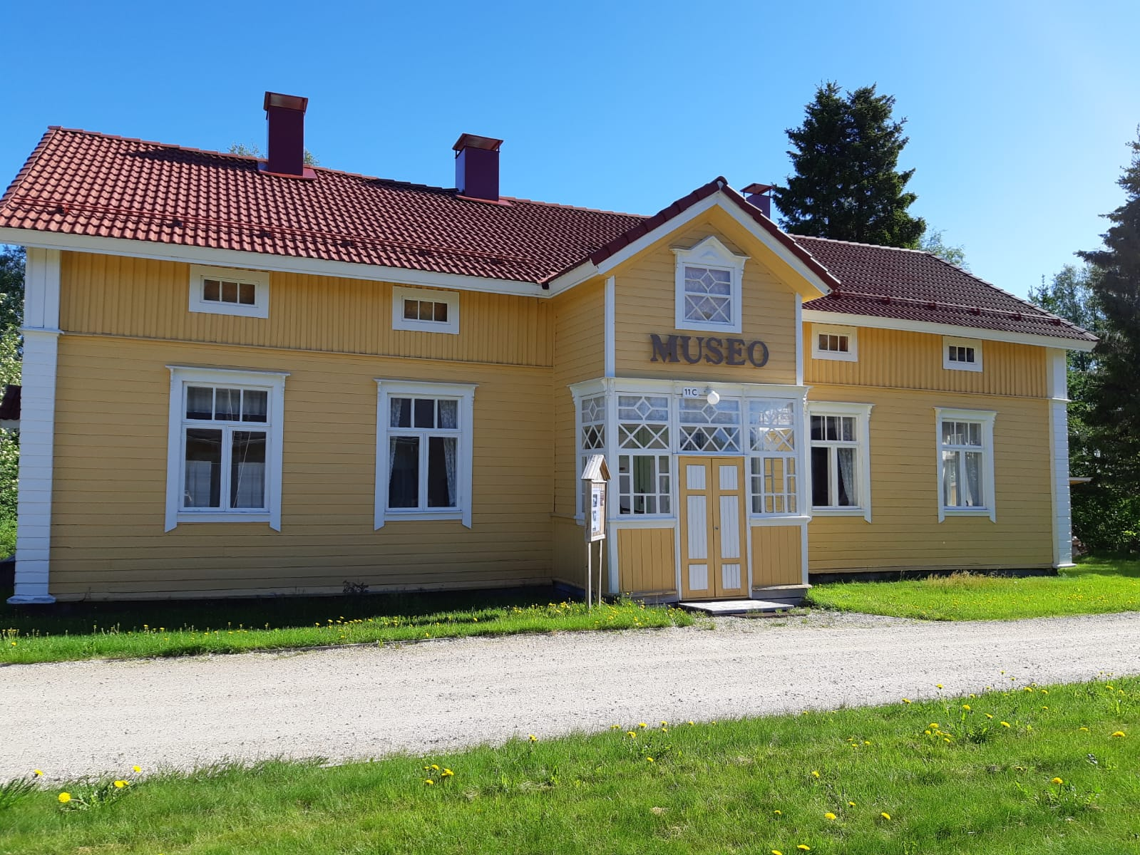 Ranuan pappila- ja pitäjämuseo, joka sijaitsee vanhassa pappilassa.